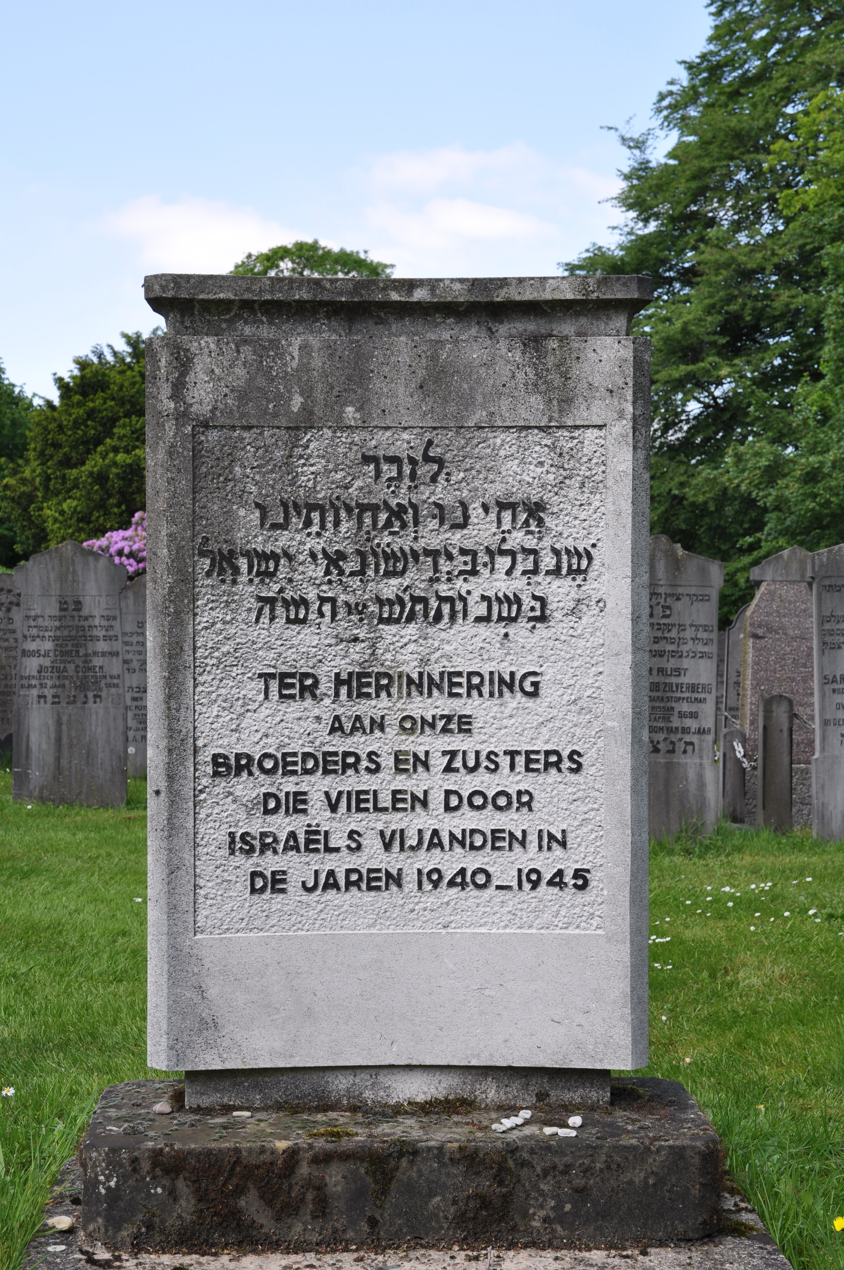 Joodse begraafplaats aan de Ballastweg in Coevorden.